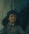 Detail schilderij van Jacob Coeman: Pieter Cnoll en gezin